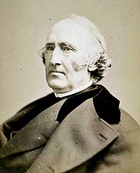 Usa abolitionist Wendell Phillips